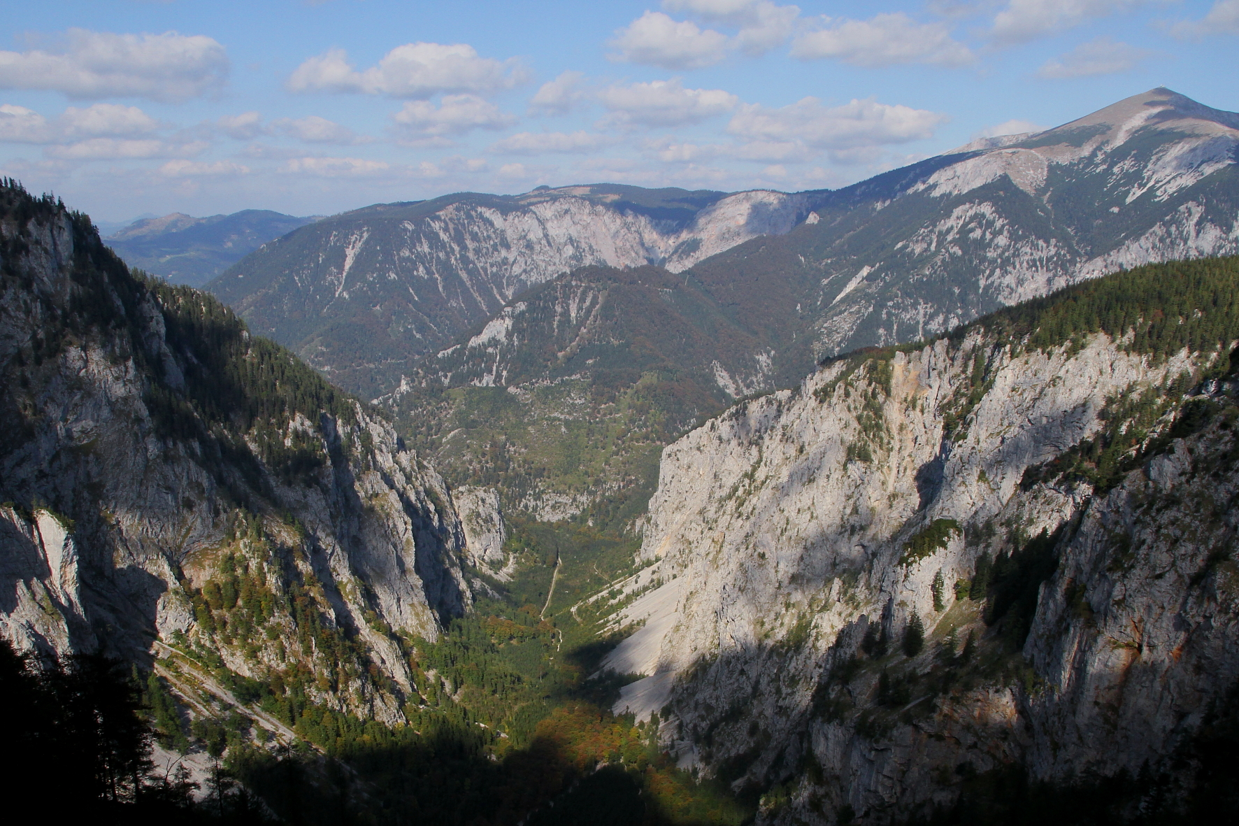 Blick vom Alpenvereinssteig in Richtung Talausgang des Großen Höllentals. Im Hintergrund das Schneebergmassiv mit dem Klosterwappen - Niederösterreichs höchster Gipfel.